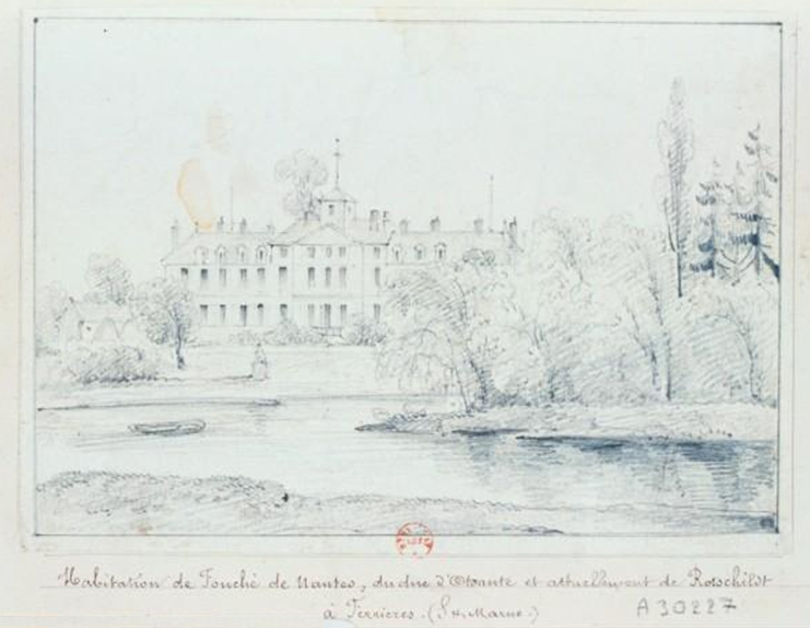 Habitation de Fouché de Nantes, du duc d'Otrante et actuellement de Rothschild à Ferrières (Seine-et-Marne)